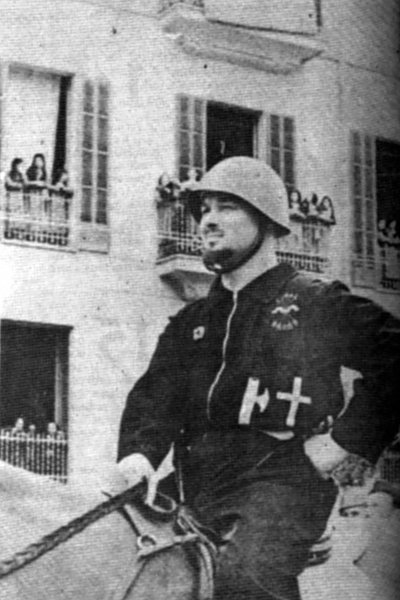 Arconovaldo Bonaccorsi sfilare a cavallo di fronte l'Istituto di Palma de Mallorca (settembre 1936).